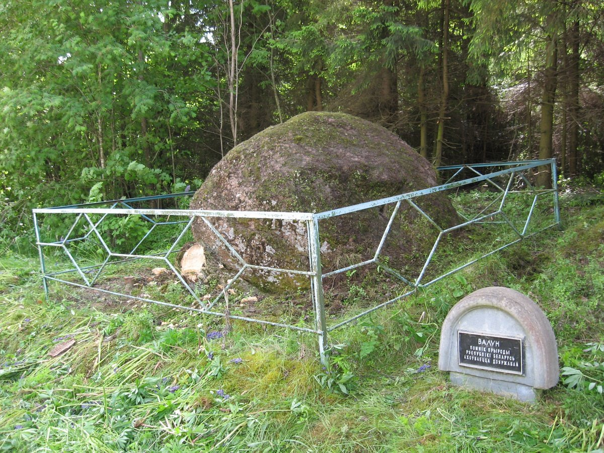 Вавукі. Грывень-камень